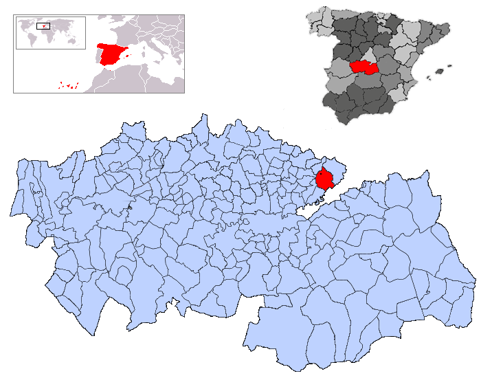 Borox en la provincia de Toledo